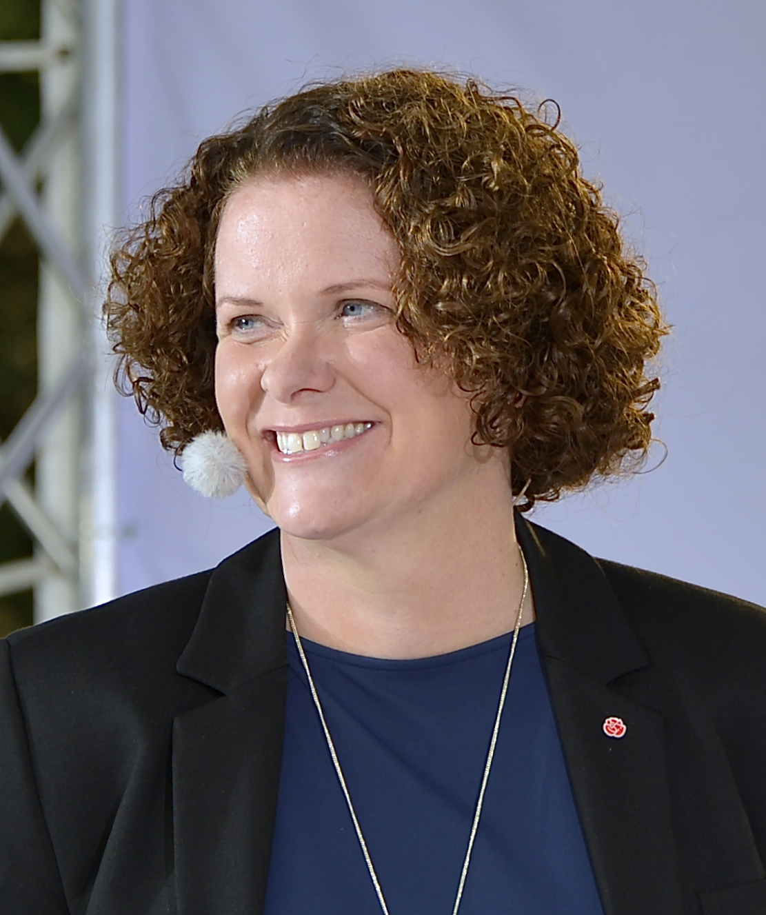 Karin Wanngård i Vasaparksduellen den 9 september 2014.